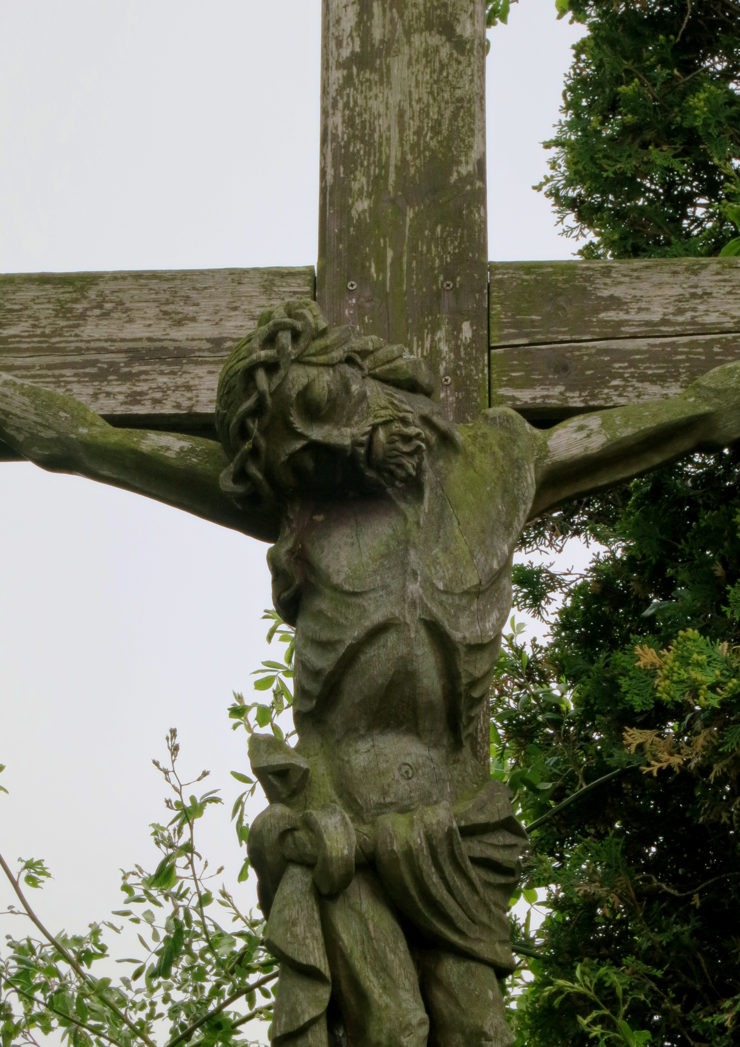 Wegkreuz Hörenzhausen - Ausdrucksstark geschnitzte Christusfigur